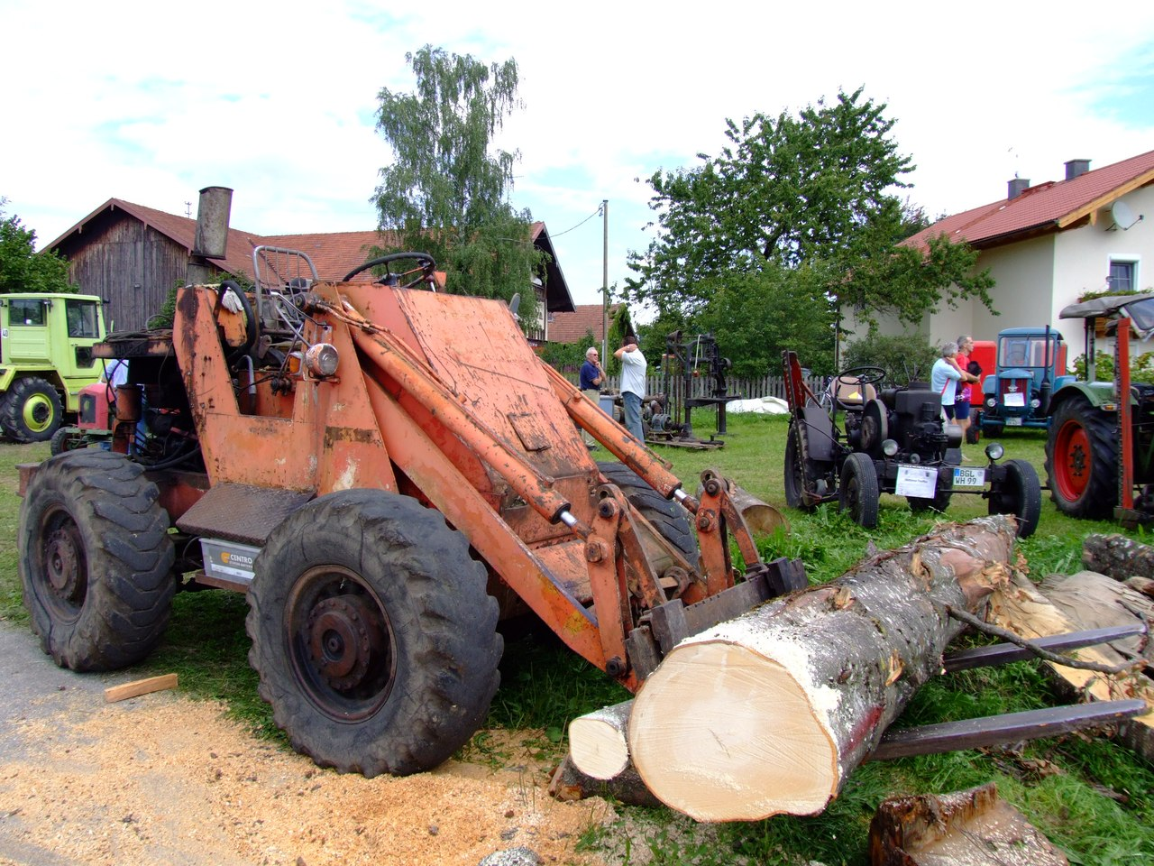 Hatra-Radlader (vermutlich Typ FL 50, FL = „Frontlader“, vermutlich Anfang/Mitte der 1960er Jahre gebaut) mit Gabelzinken statt Schaufel